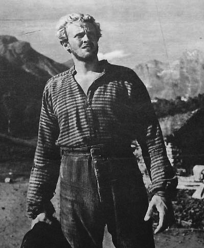 Bengt Blomgren (1923-2013) in the film Flickan från Fjällbyn (1948)